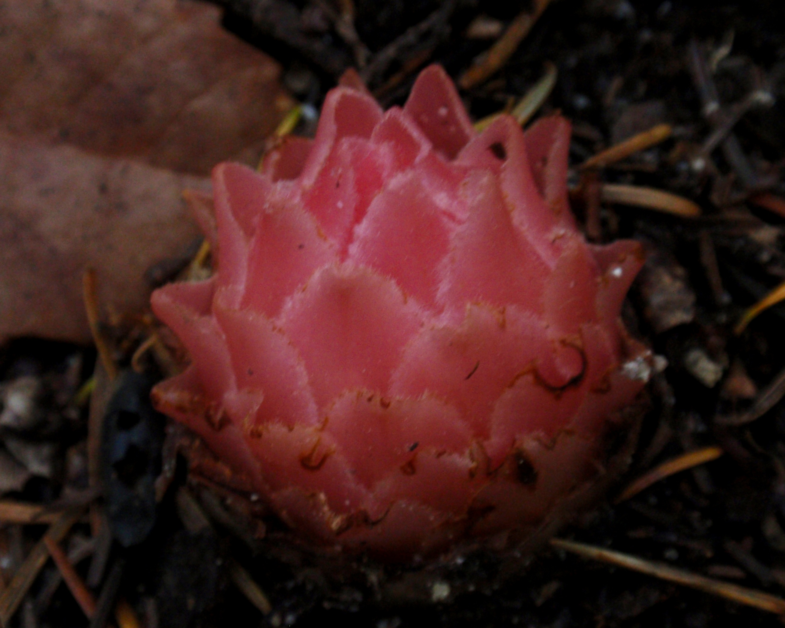 Pleuricospora fimbriolata in Kruse Rhododendron State Reserve